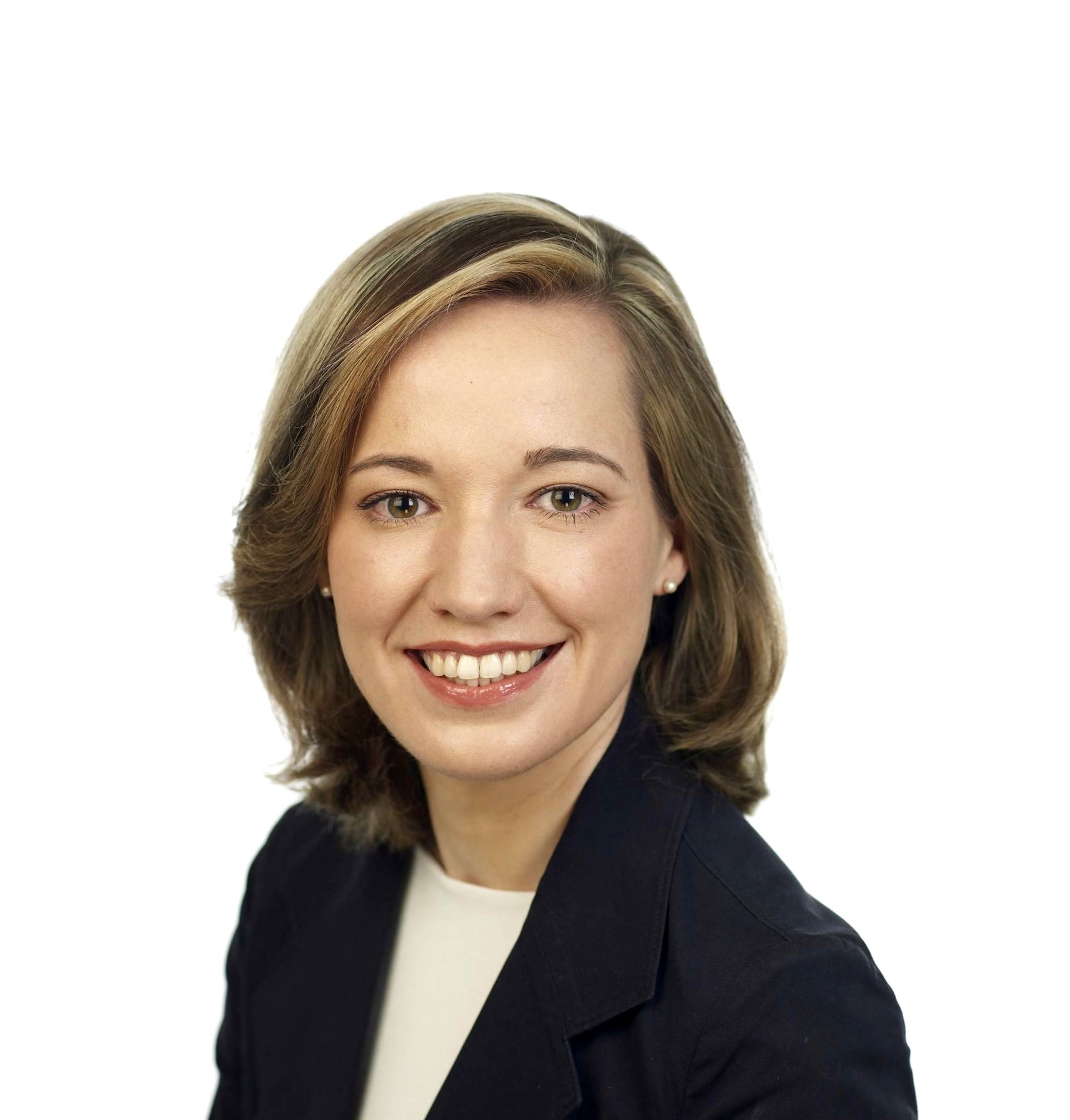 Portrait de Kristina Schröder, femme politique allemande de la CDU